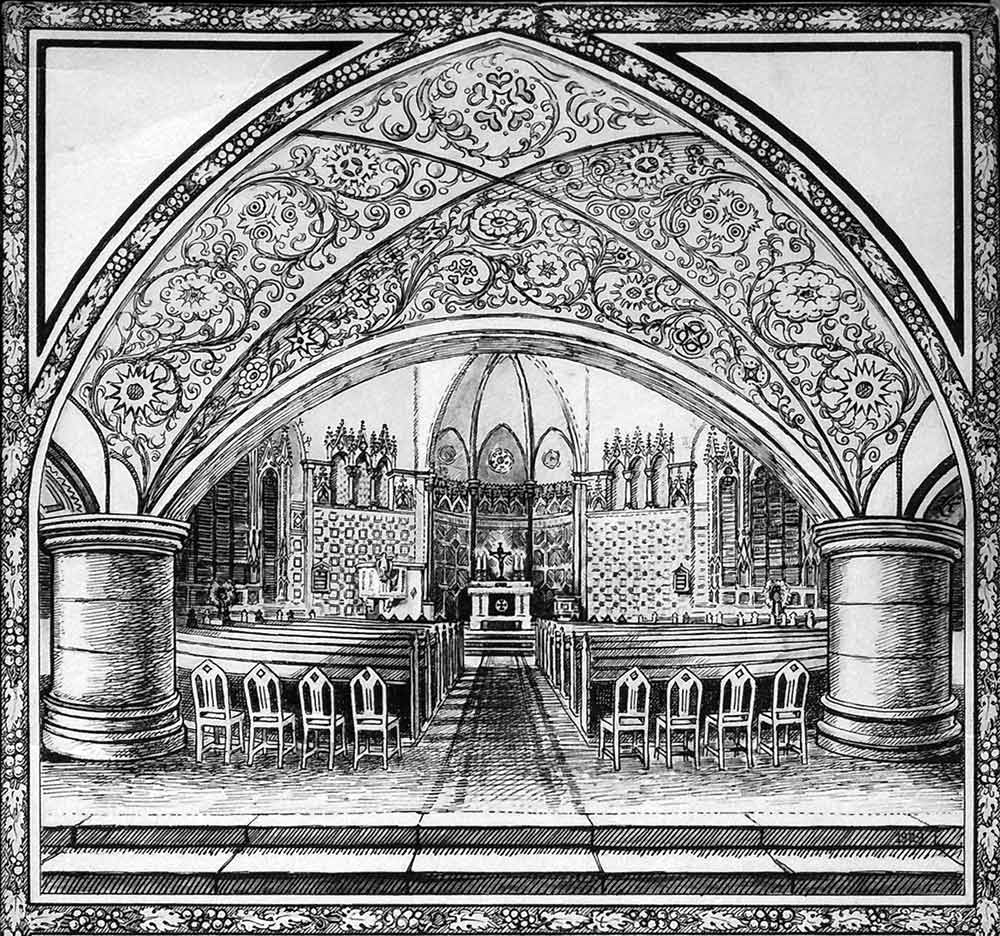 Graphik des Innenraums der Adventkirche